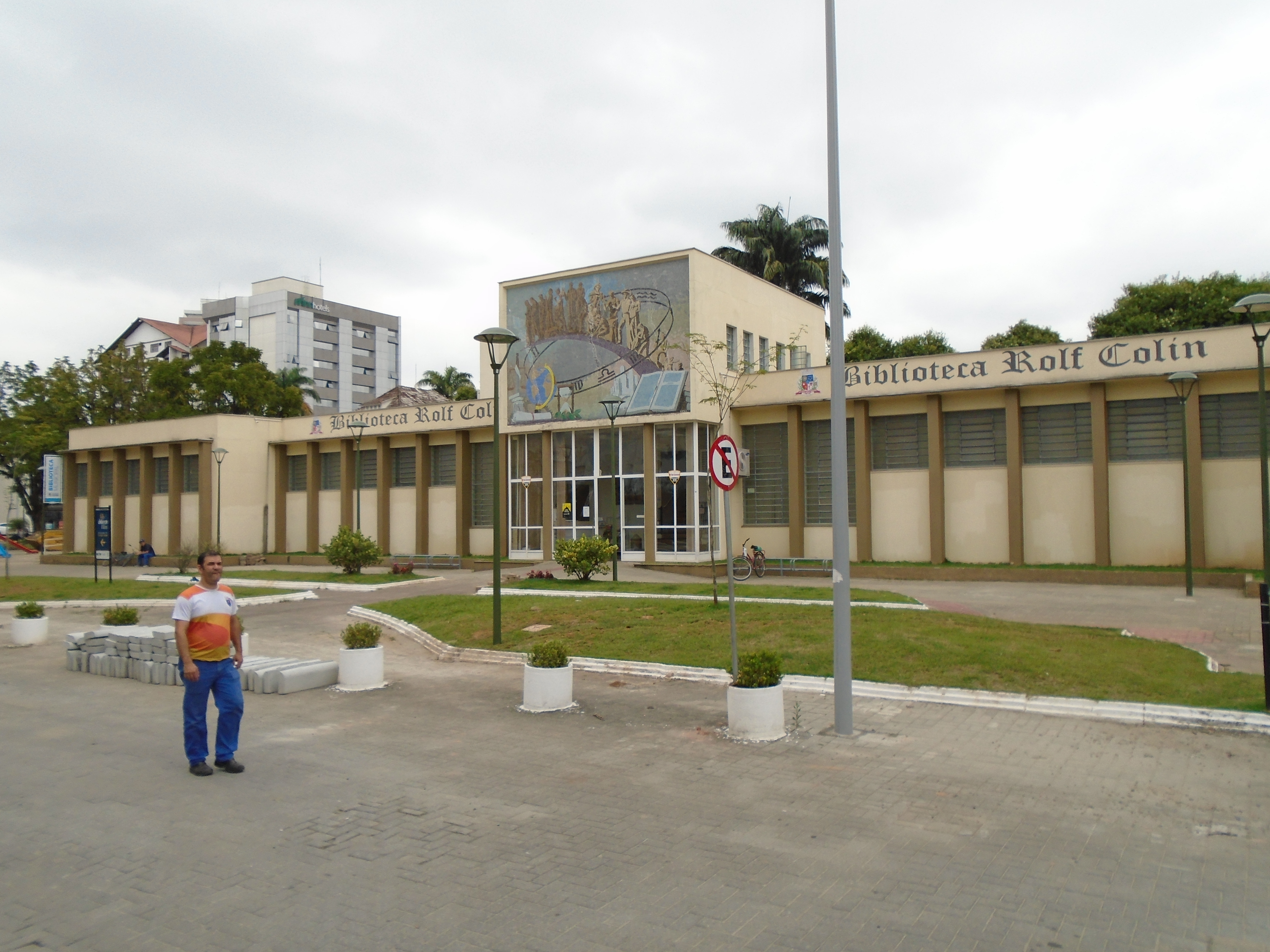 Joinville